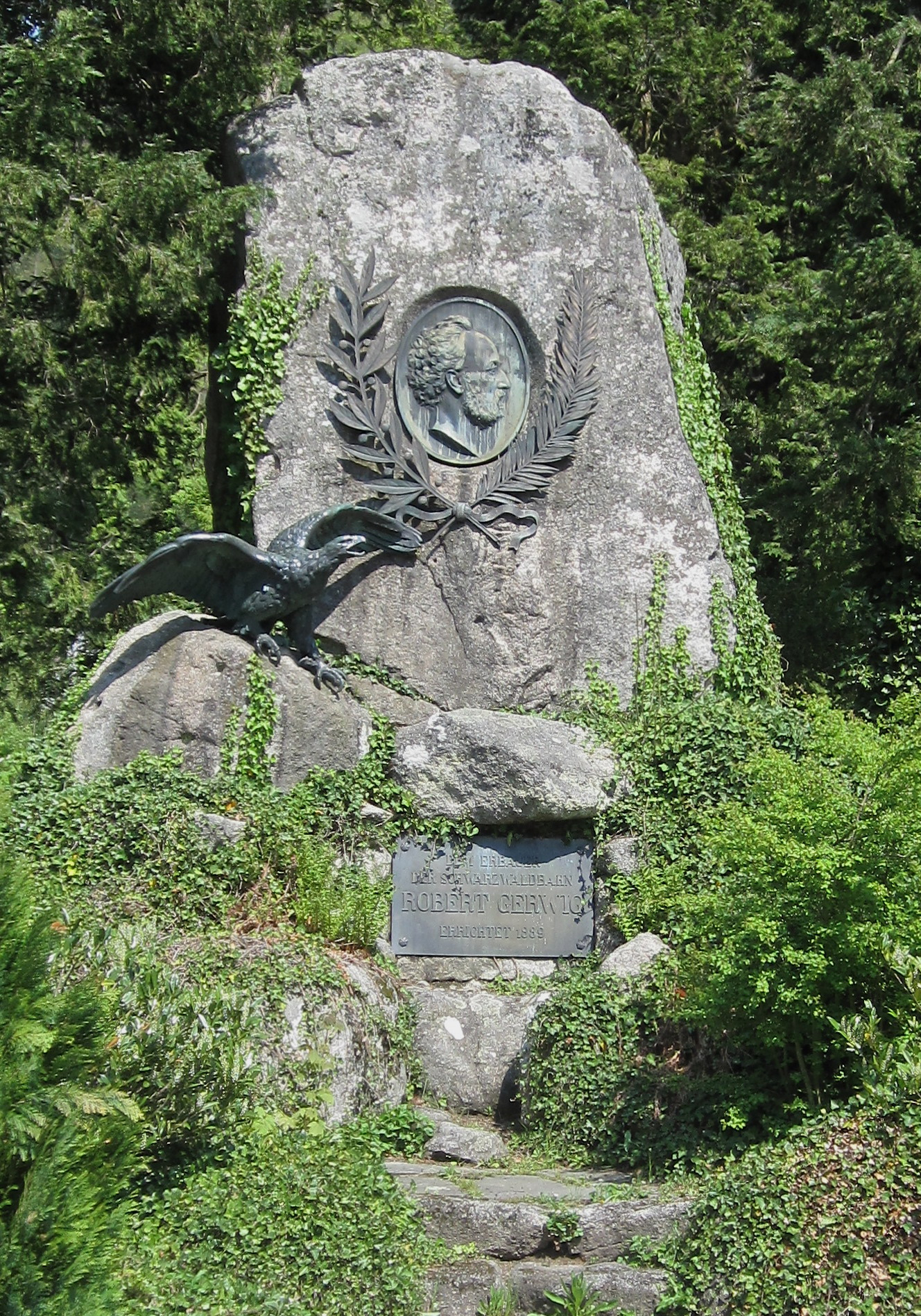 Gedenkstein für den Erbauer der Schwarzwaldbahn - Robert Gerwig, errichtet 1899